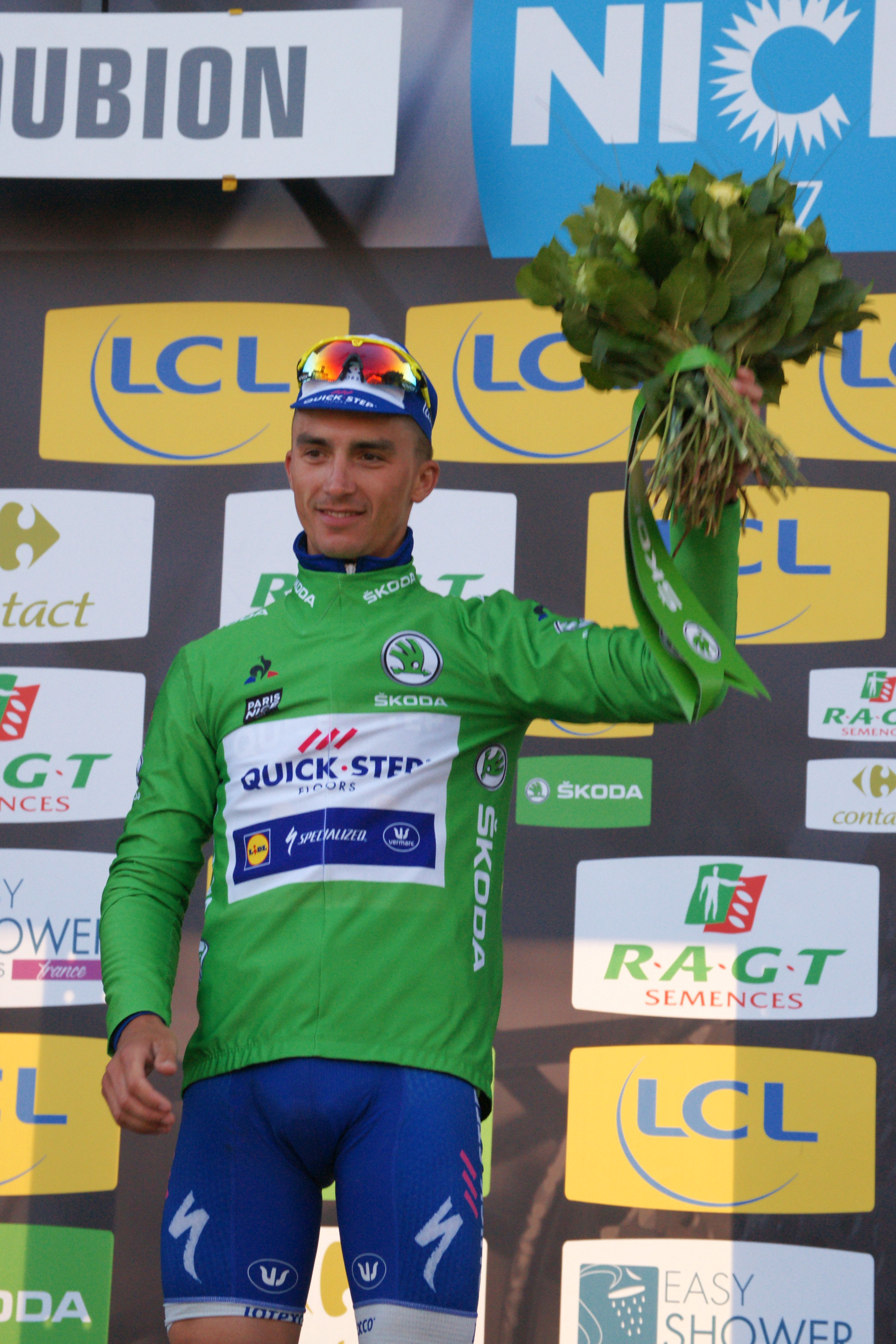 Julian Alaphilippe vert Roubion Par-s-Nice 2017